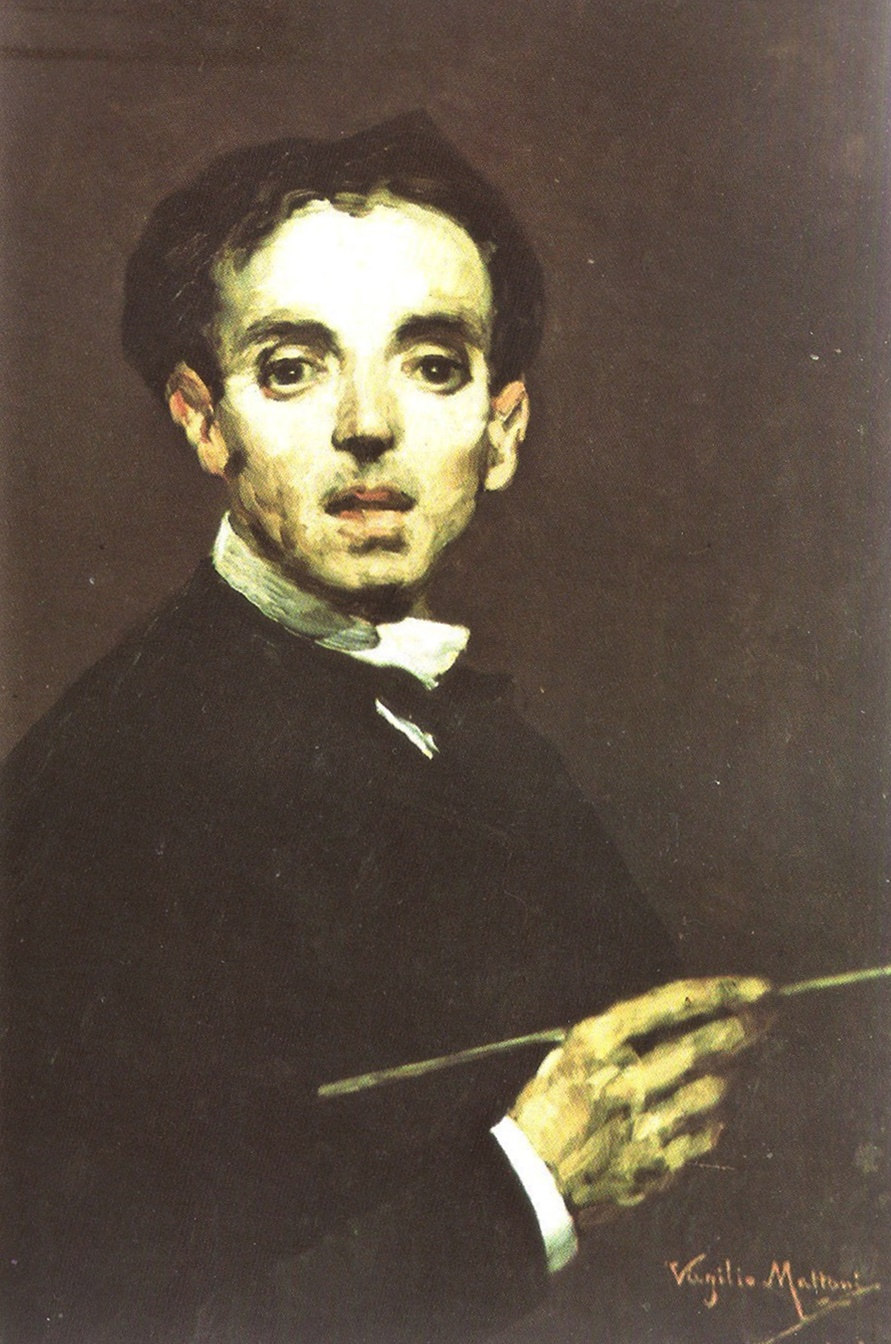 Virgilio Mattoni. Autorretrato. Colección de Félix Lacárcel.